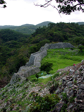 Nakijin Castle